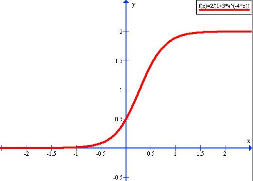 Grafen for logisitisk vækst er tegnet med rød